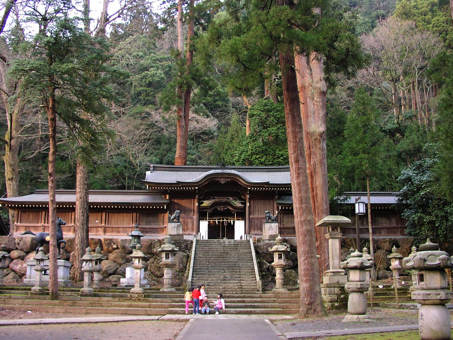 福井県越前市の大瀧神社・岡太神社